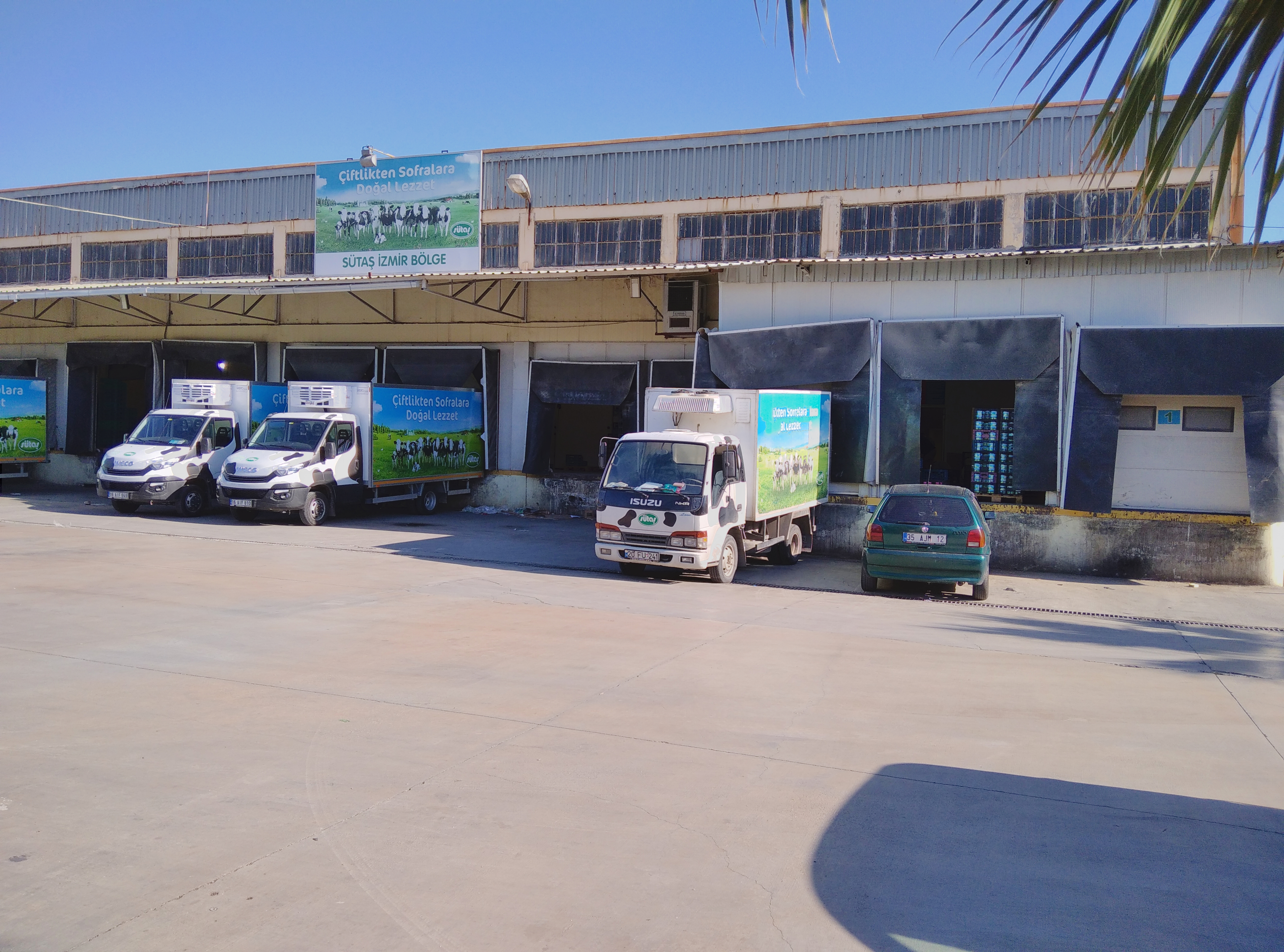 Sütaş